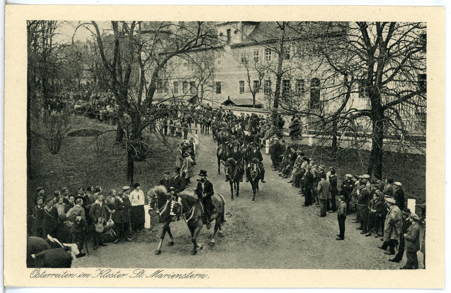 Marienstern; Osterreiten im Kloster St. Marienstern This postcard is from publisher Brück & Sohn in Meißen ( postcard has a unique number 22995 and is available in a higher resolution at the publisher. This images was uploaded in a cooperation project between Wikipedians and the publisher.